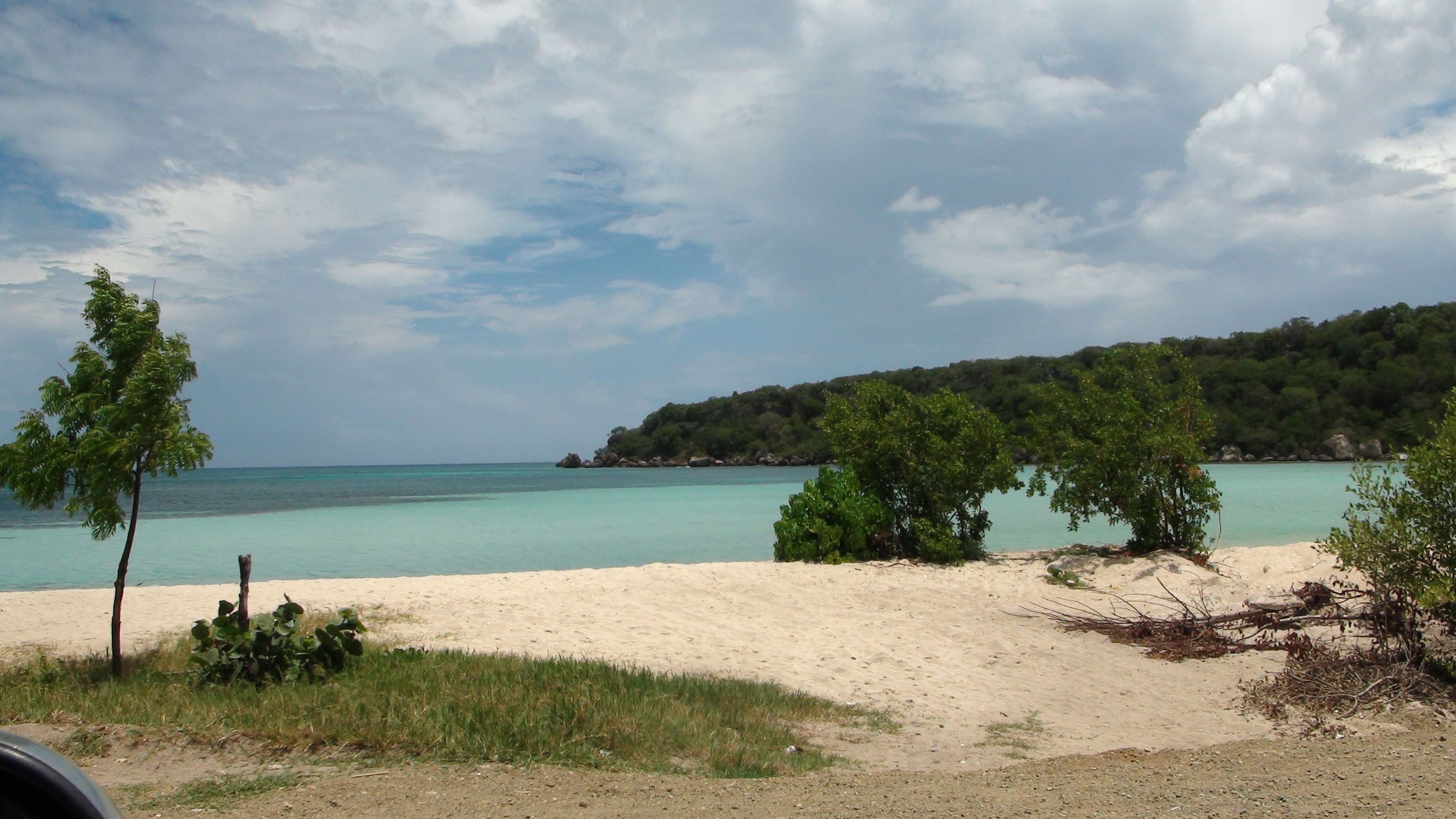 Stand bij een huis bij Punta Rusia, Puerto Plata